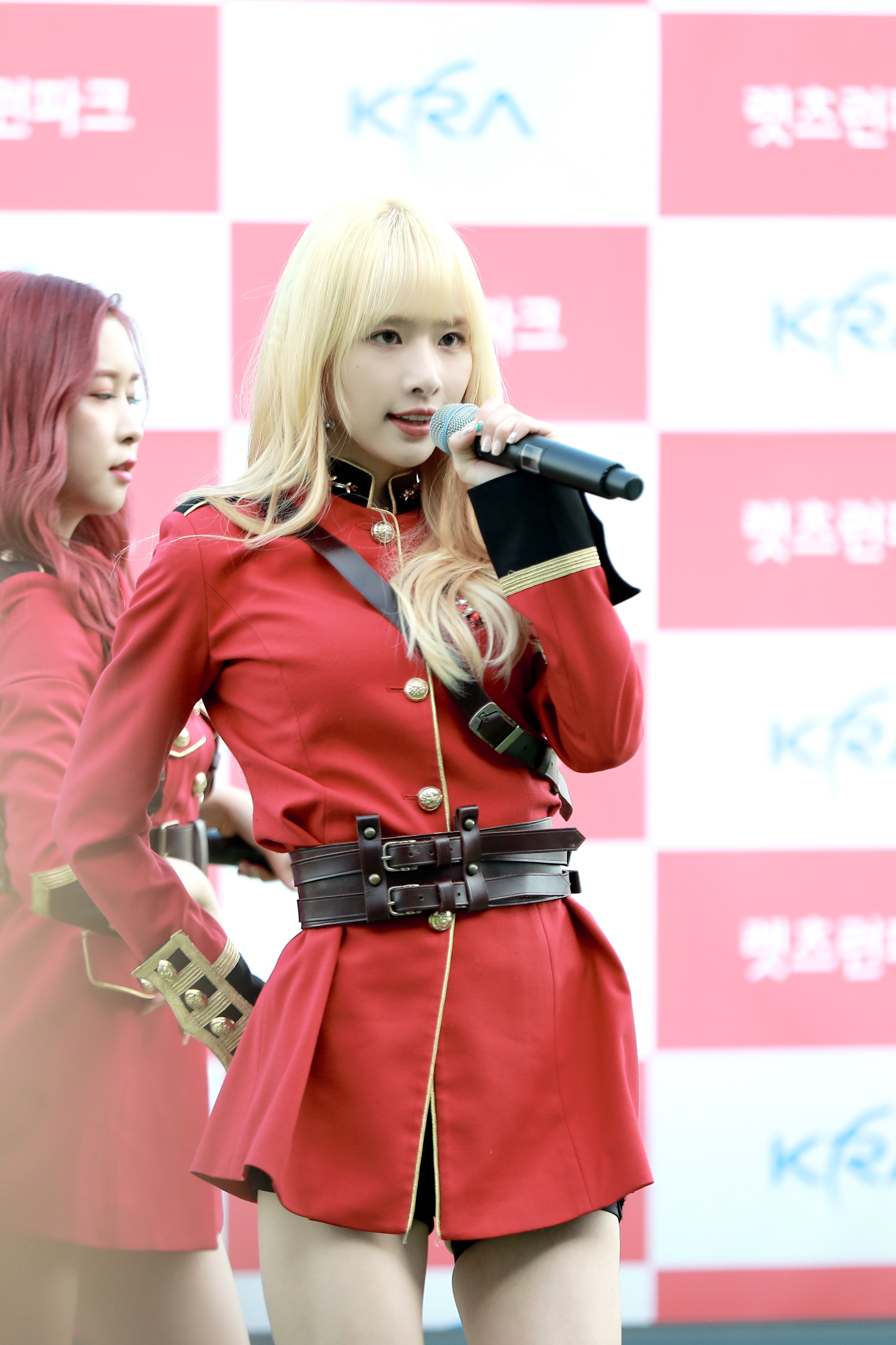 2018.09.09 우주소녀 '너에게 닿기를' '꿈꾸는 마음으로' - 렛츠런파크 코리안컵